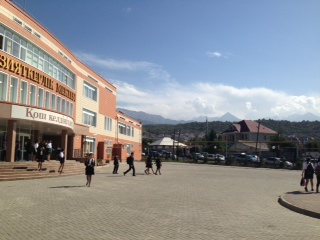 Назарбаев Зияткерлік Мектебі